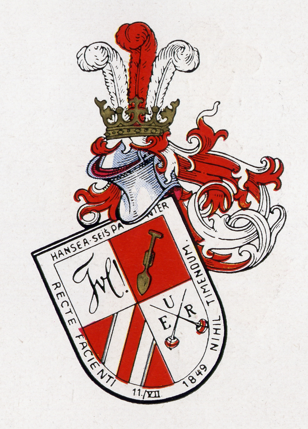 Studentenwappen des Corps Hansea Bonn